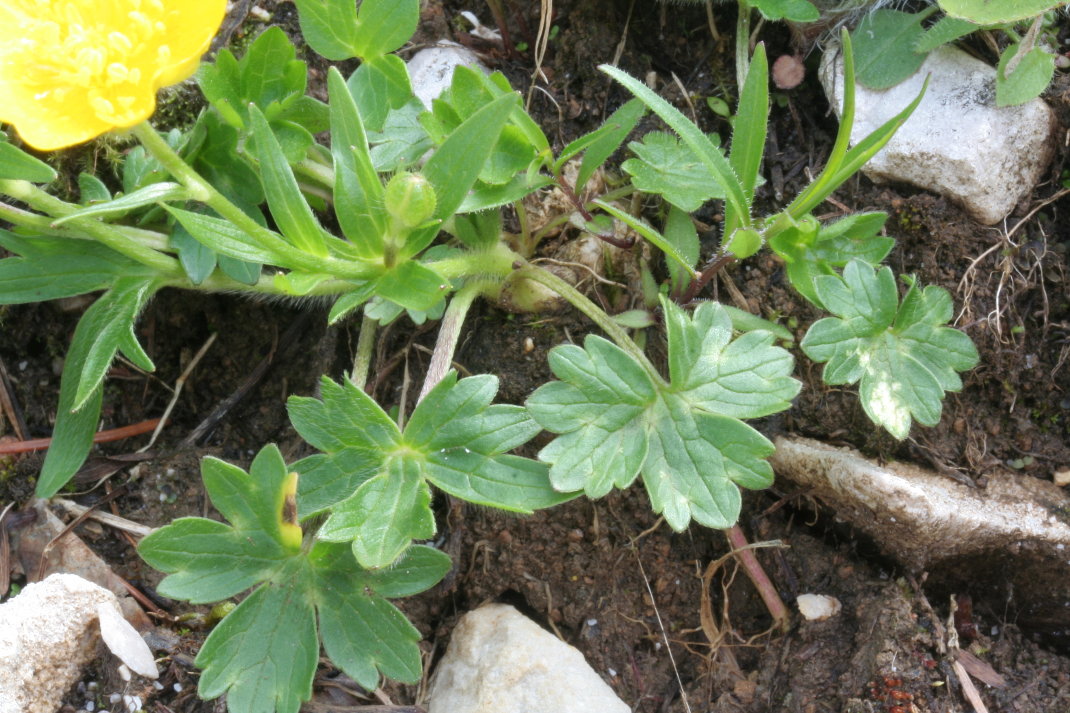 Ranuncolo montano - Località: La Faverghera (BL), 1413 m s.l.m.